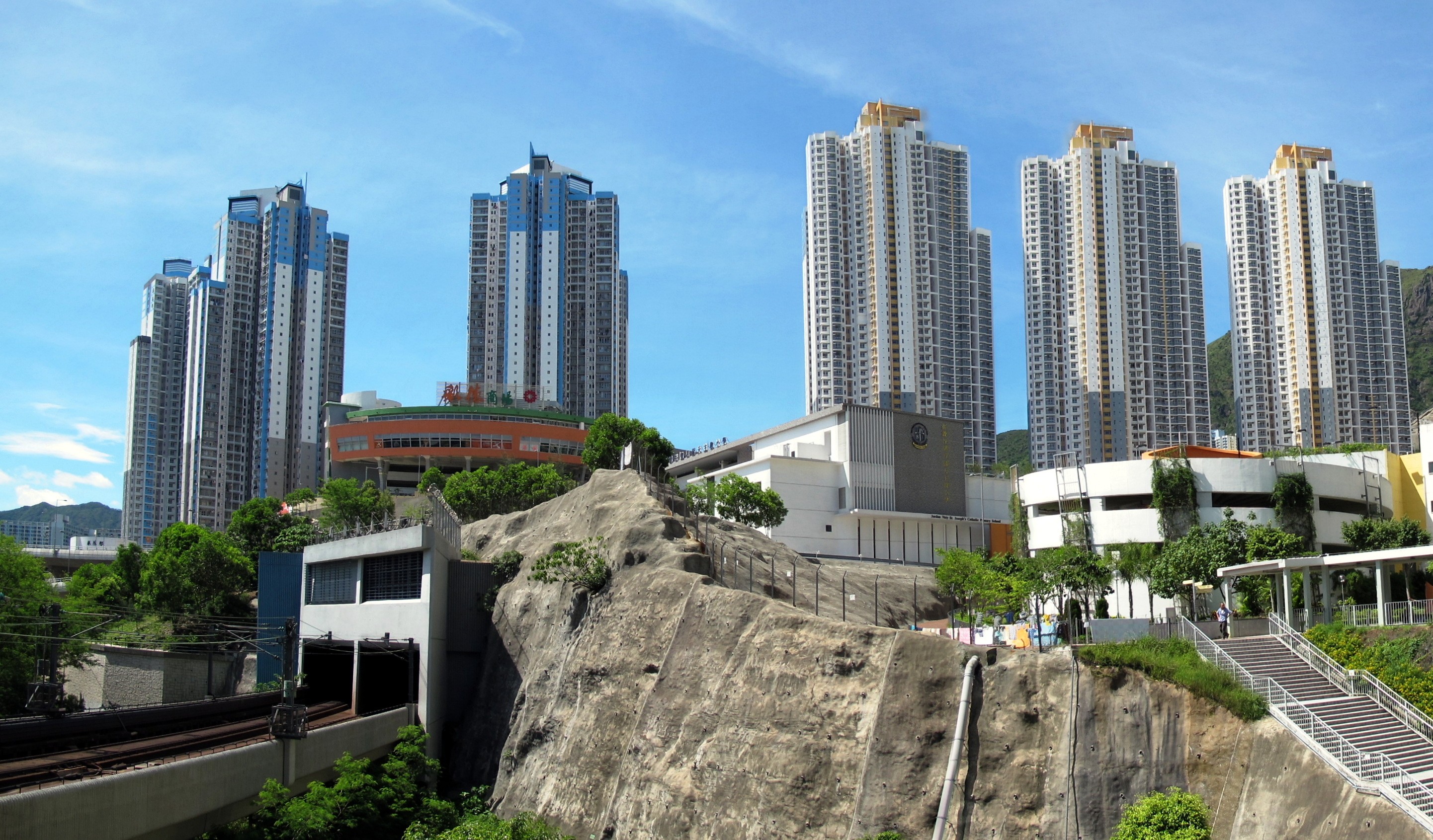 Choi Tak Estate 彩德邨